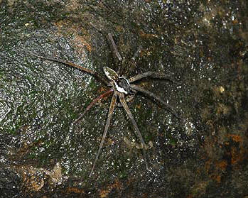 male Dolomedes yawatai from Okinawa.